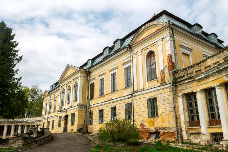 Свяцкі палац.